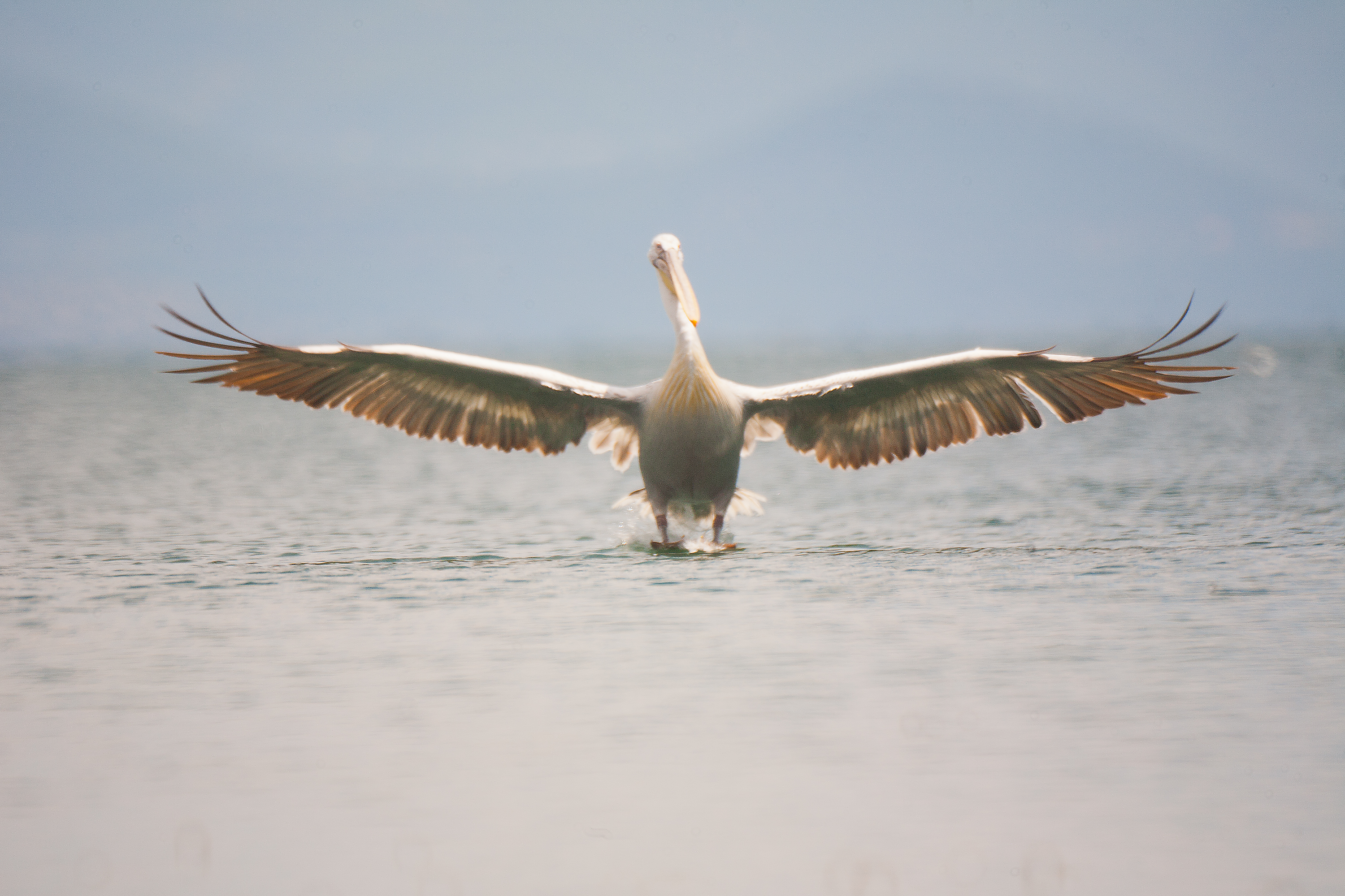 Pelikan vo sletuvanje